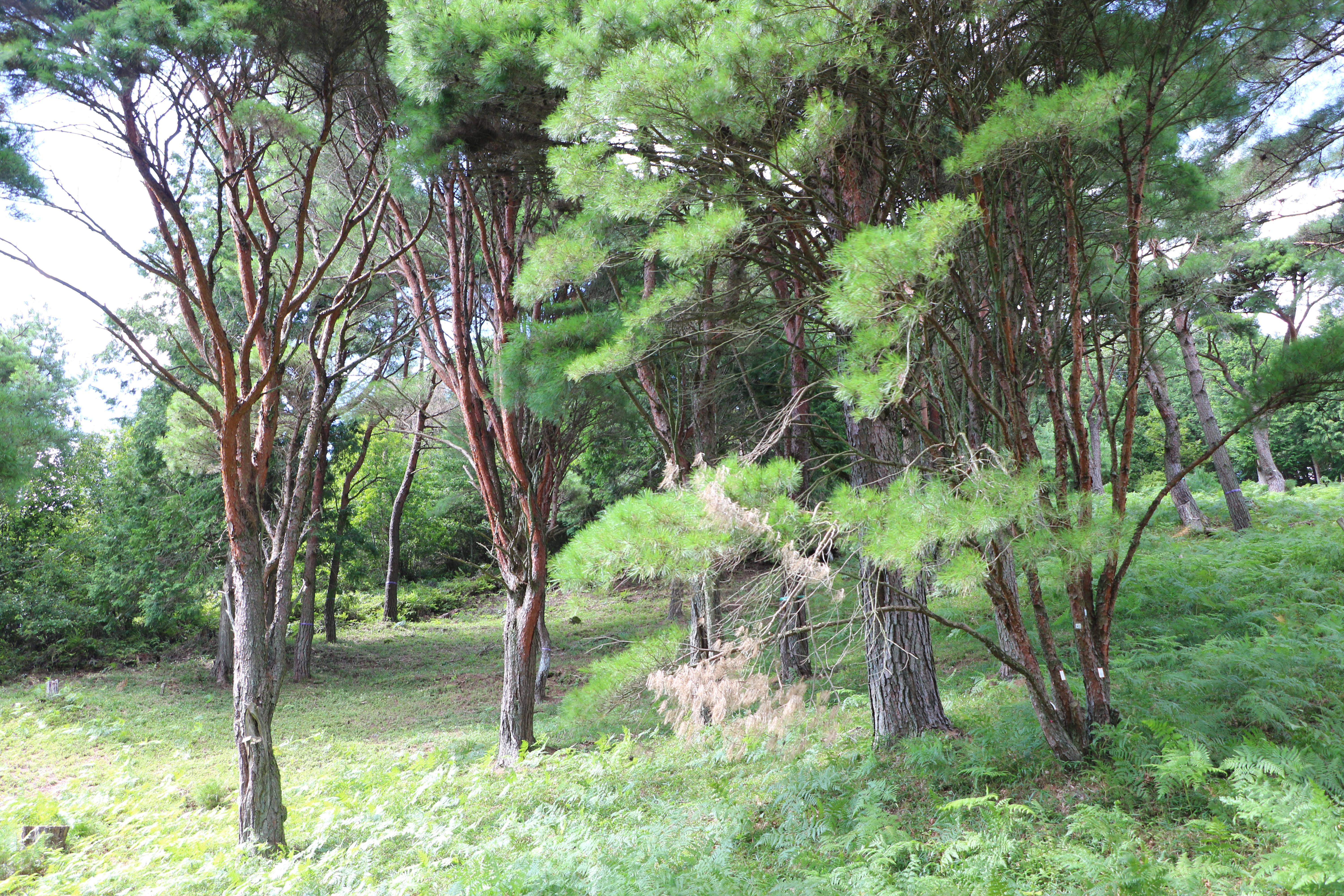 平松のウツクシマツ自生地（国指定天然記念物、滋賀県湖南市）